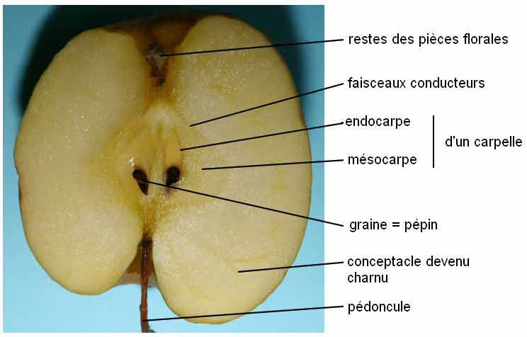 coupe_pomme_legende_octobre.jpg